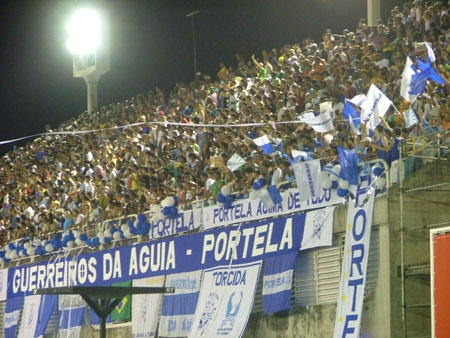 Template:Torcida Guerreiros da Águia no Sambródromo - Setor 3 - Carnaval de 2007.